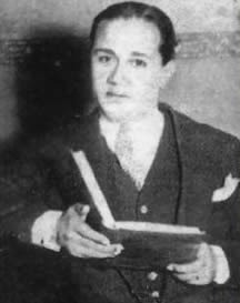 Celedonio Flores en los años '30.